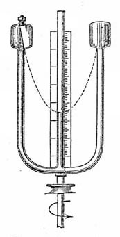 Browns Gyrometer